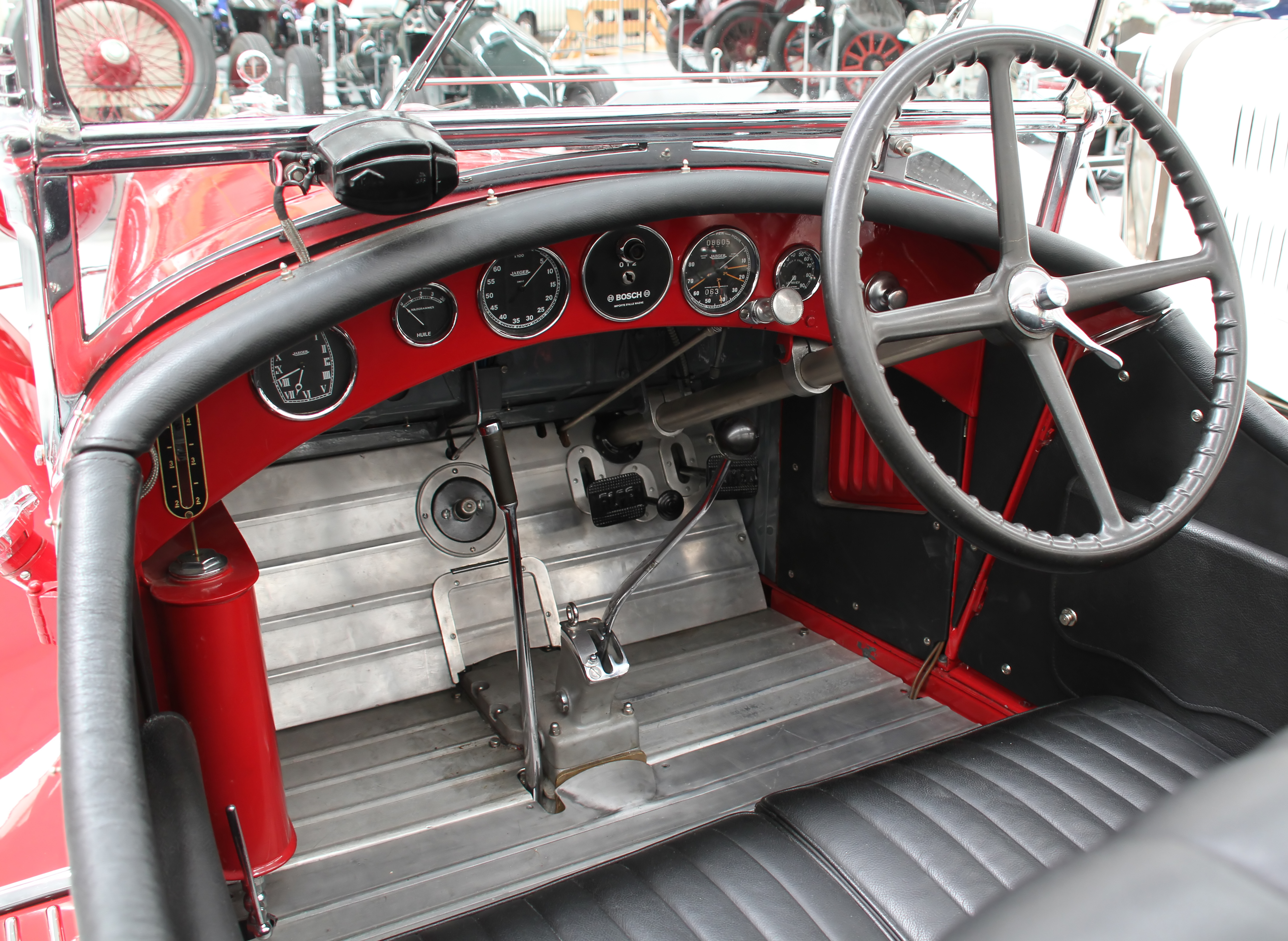 1930 Alfa Romeo 6c 1750 GS cockpit